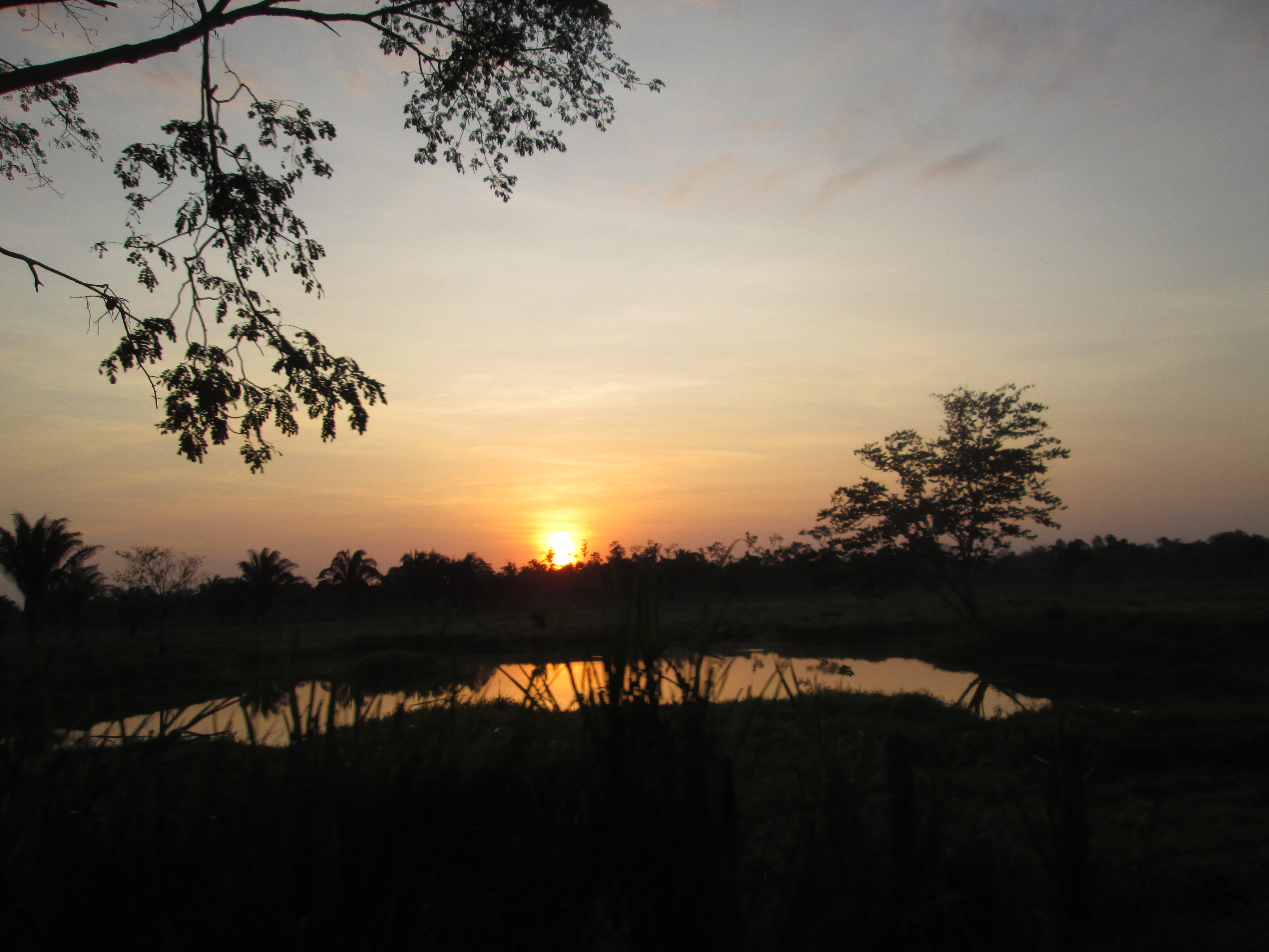 Esta fotografía fue tomada en el municipio colombiano con código 81794.